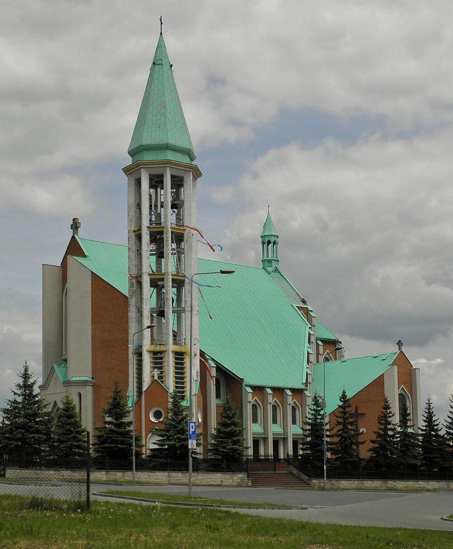 Kościół św. Kazimierza.